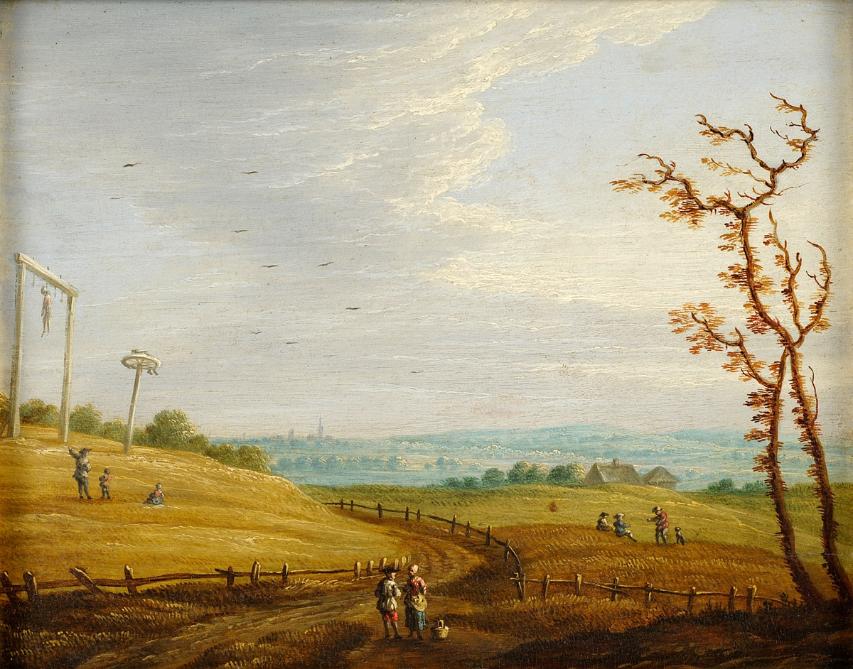 Flämische Landschaft mit Galgenberg. Öl auf Holz, 18 x 22 cm. Provenienz: Kunstsalon Abels, Köln dort als eigenhändiges Werk des Franz de Momper 1603-1660.